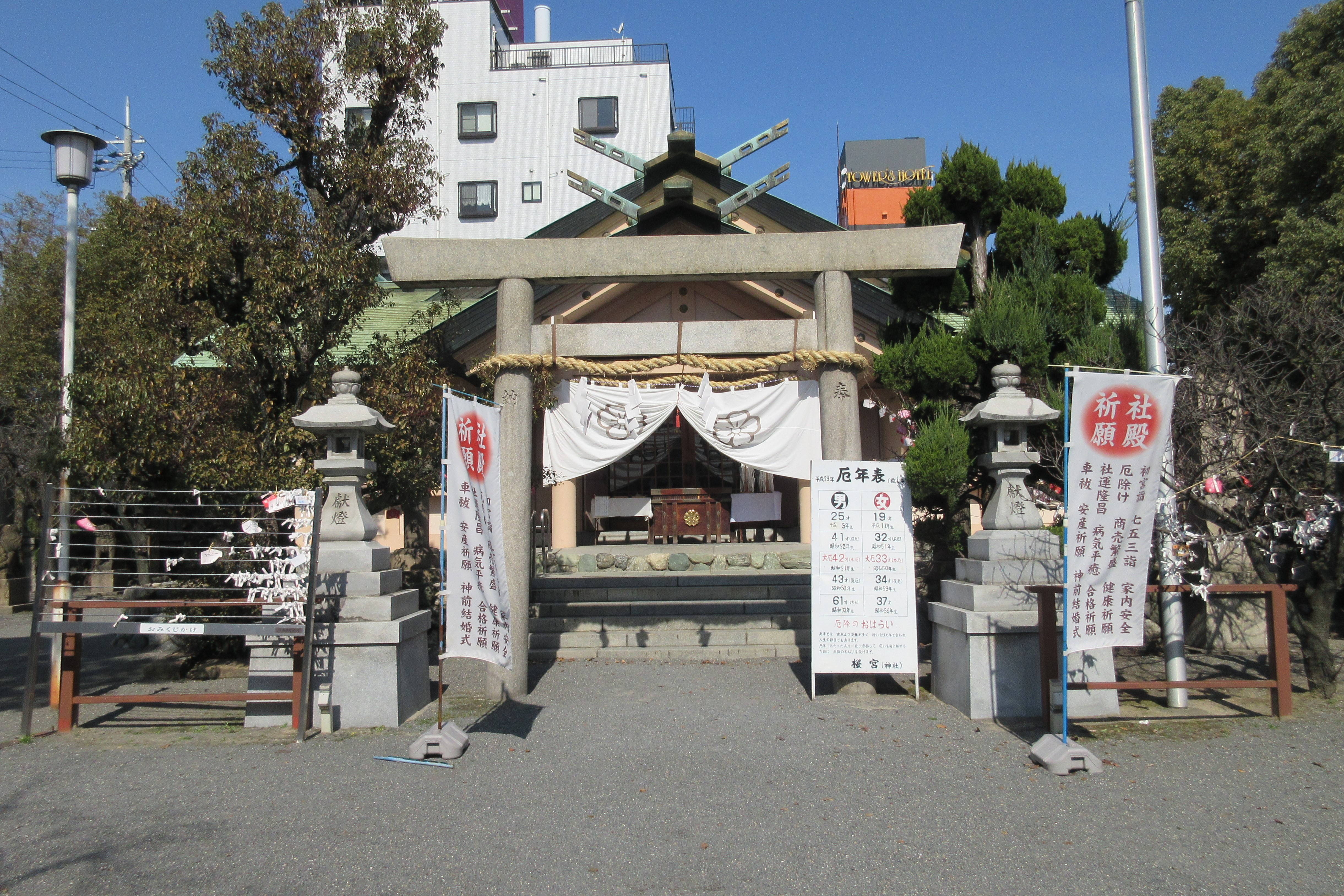 櫻宮（桜宮神社）